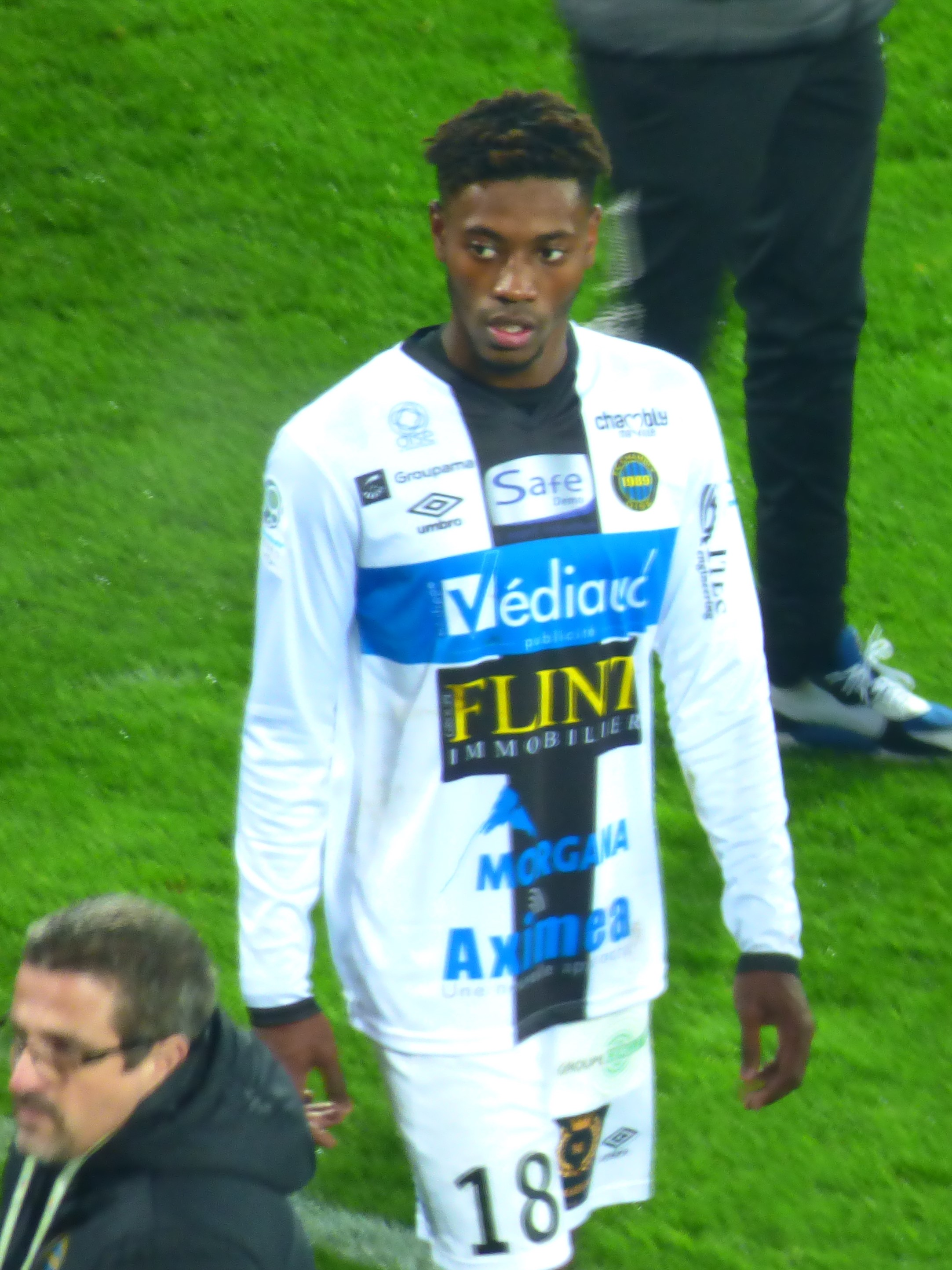 Saquil Delos lors du match Lens - Chambly, comptant pour la dix-septième journée du championnat de France de football de Ligue 2 2019-2020, le 3 décembre 2019.